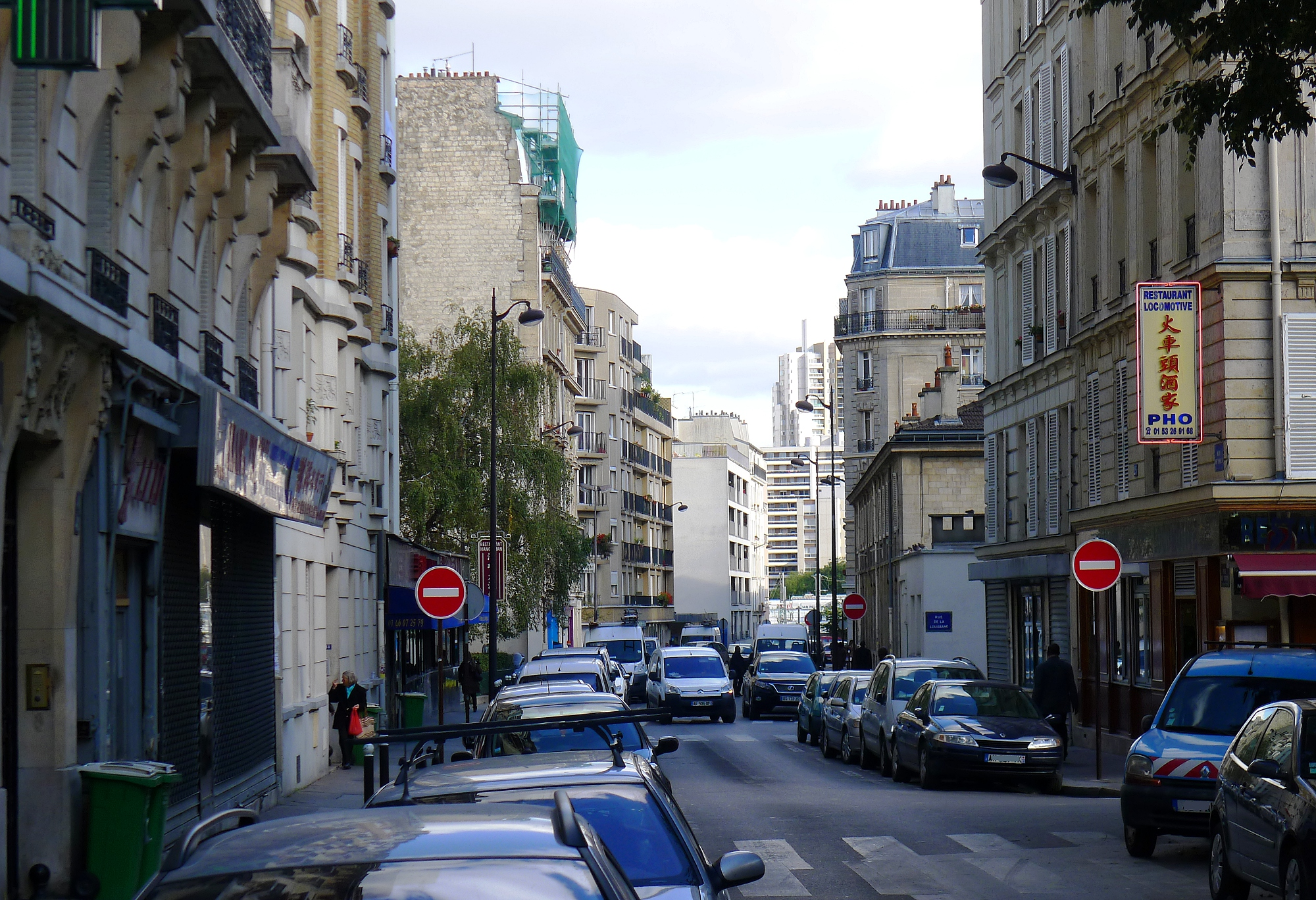 Rue de Torcy - Paris XVIII